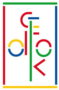 offizielles Logo des Bundesverbands der GEDOK